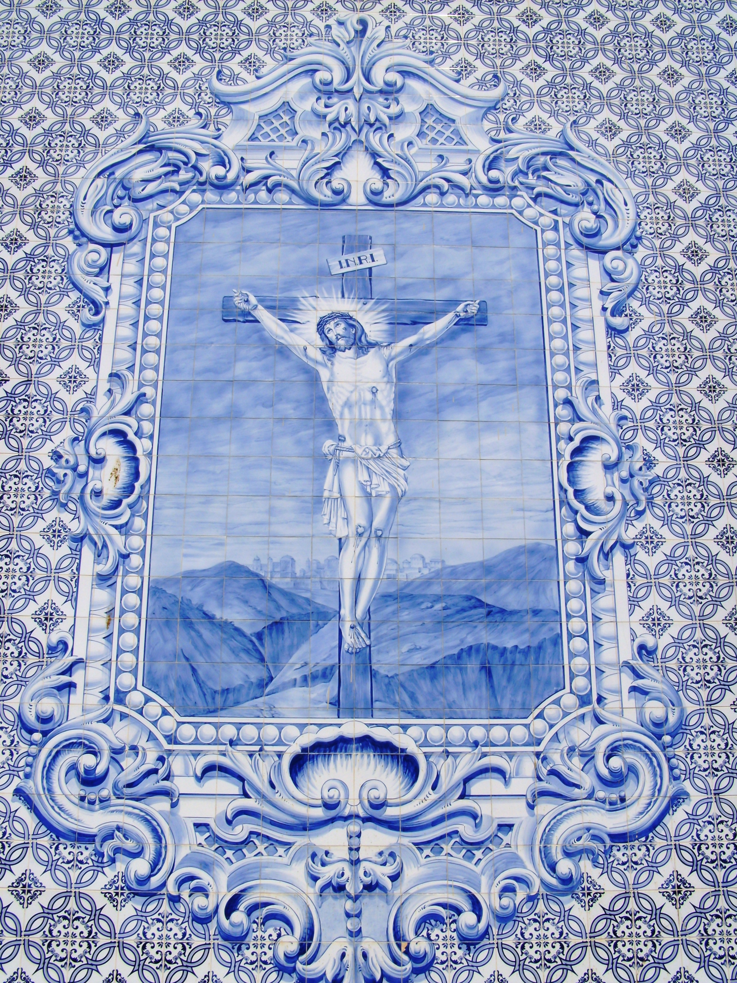 Igreja de Santa Marinha de Cortegaça, concelho de Ovar, distrito de Aveiro, Portugal: detalhe do painel de azulejos no alçado direito.